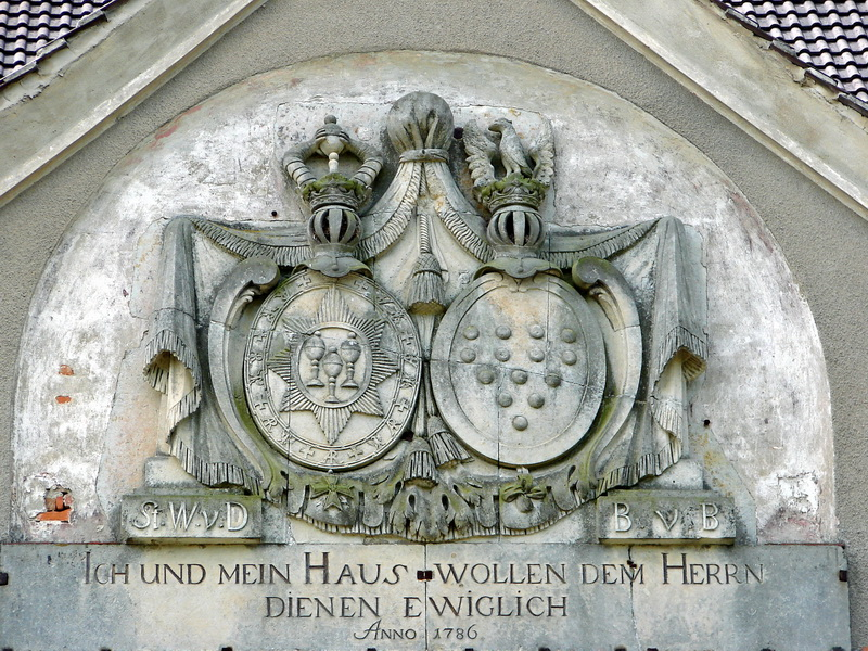 Wappen der Familien Dewitz und Bülow am Gutshaus in Cölpin, Mecklenburg